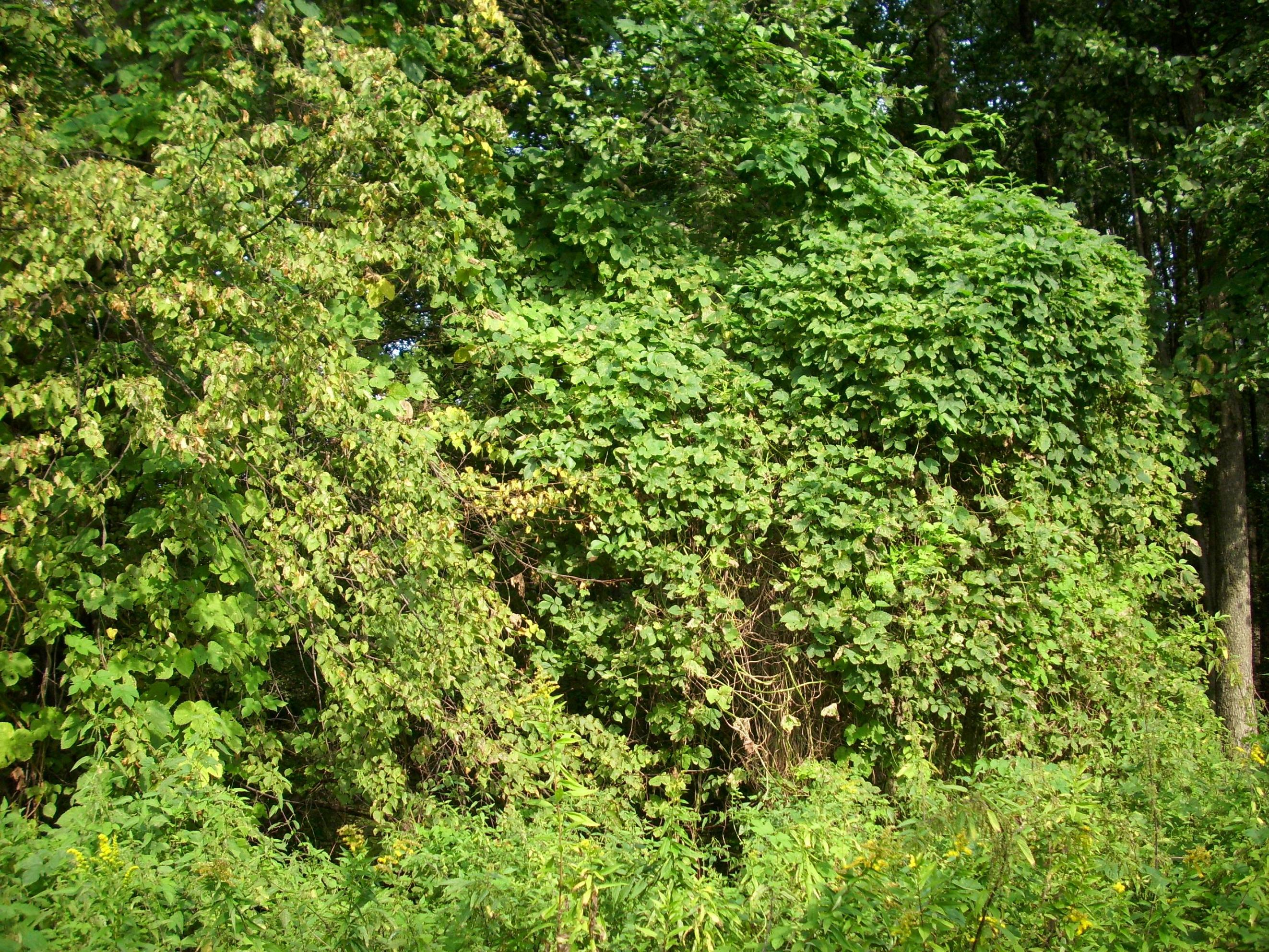 Chmiel zwyczajny, oplatający drzewa w Lesie Bemowskim